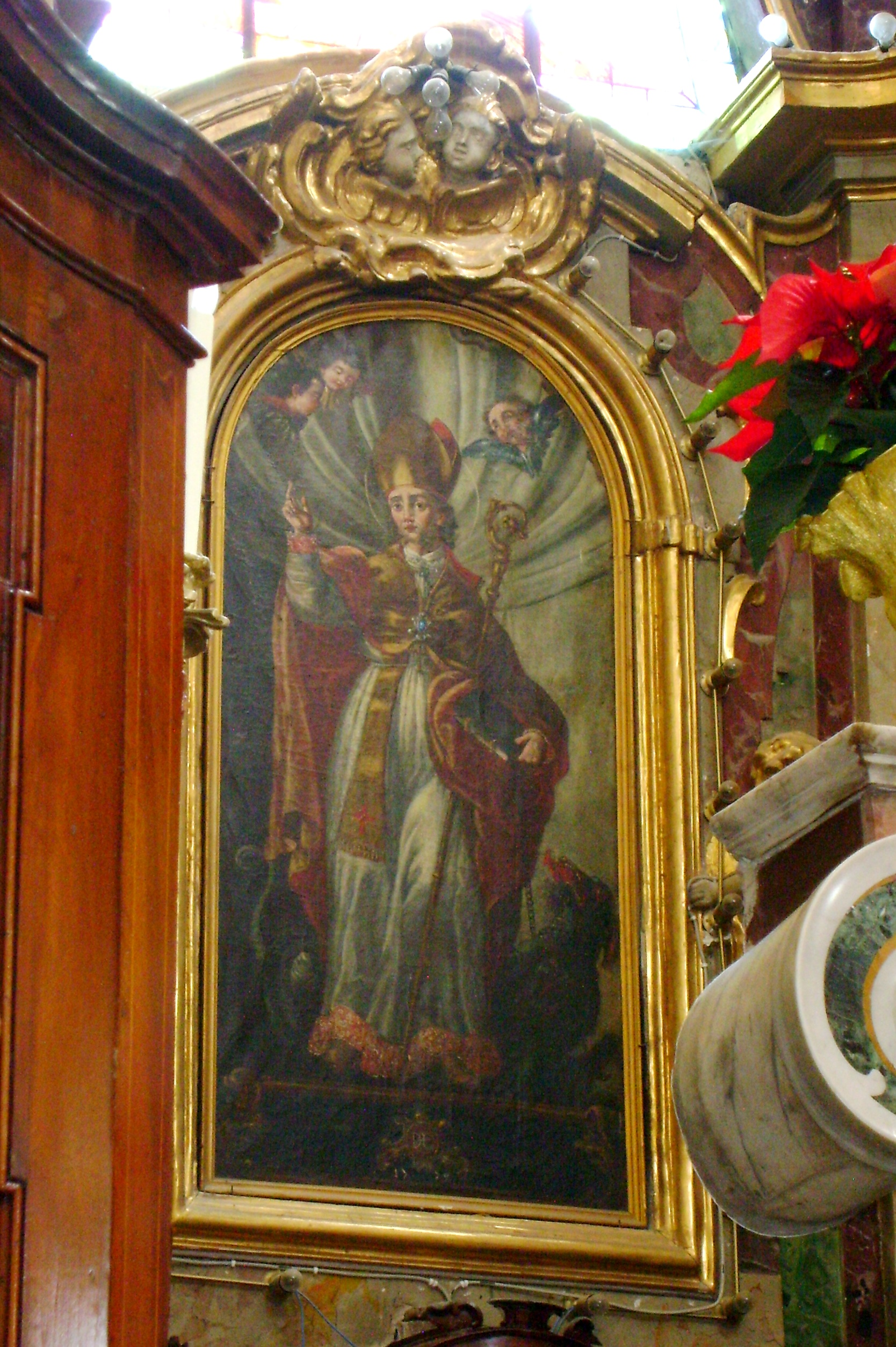 Dipinto di San Leucio nell'omonima chiesa, Atessa, Chieti.